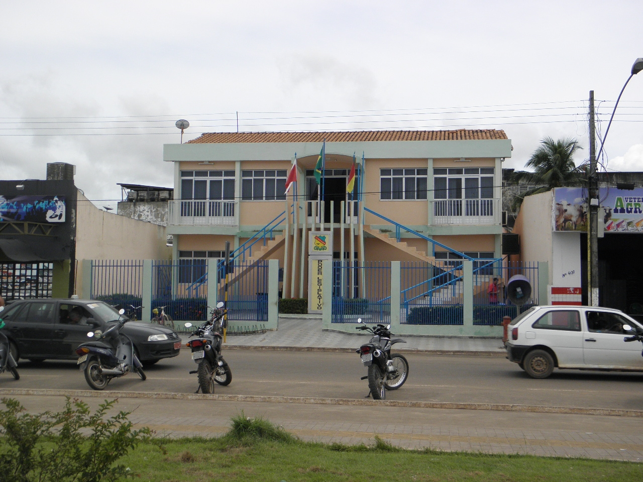 Camara de Vereadores de Itaituba